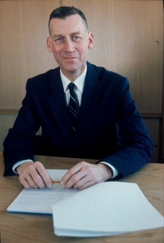 Knudtzon, Nic. Forskningsdirektør i Televerket 1968 til 1992